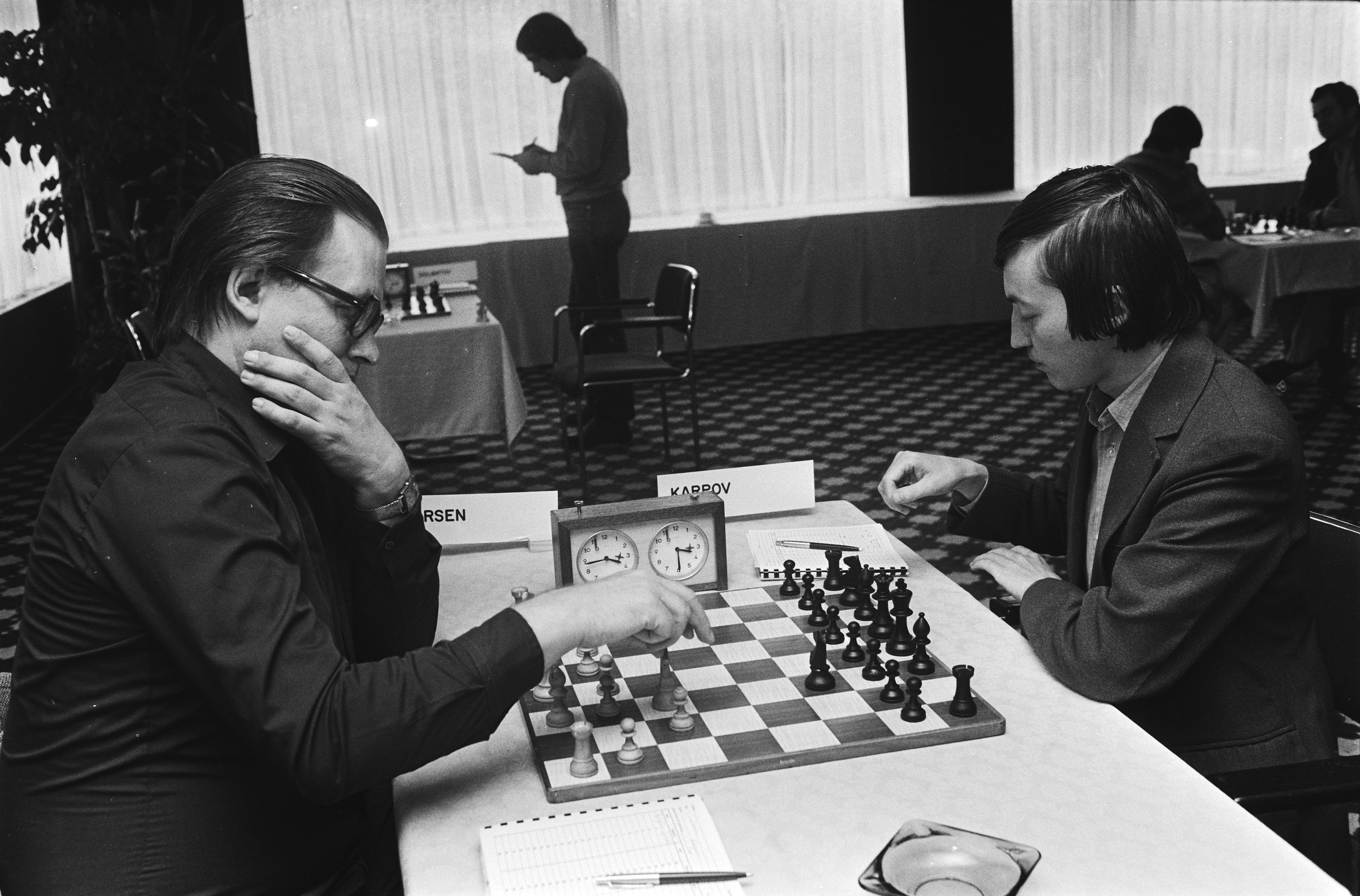 Collectie / Archief : Fotocollectie Anefo Reportage / Serie : IBM-schaaktoernooi: laatste ronde Beschrijving : Larsen (links) speelt tegen Karpov Datum : 14 juli 1980 Trefwoorden : schaken, schakers, wedstrijden Persoonsnaam : Karpov, A., Larsen, Bent Fotograaf : Pereira, Fernando / Anefo Auteursrechthebbende : Nationaal Archief Materiaalsoort : Negatief (zwart/wit) Nummer archiefinventaris : bekijk toegang 2.24.01.05 Bestanddeelnummer : 930-9173